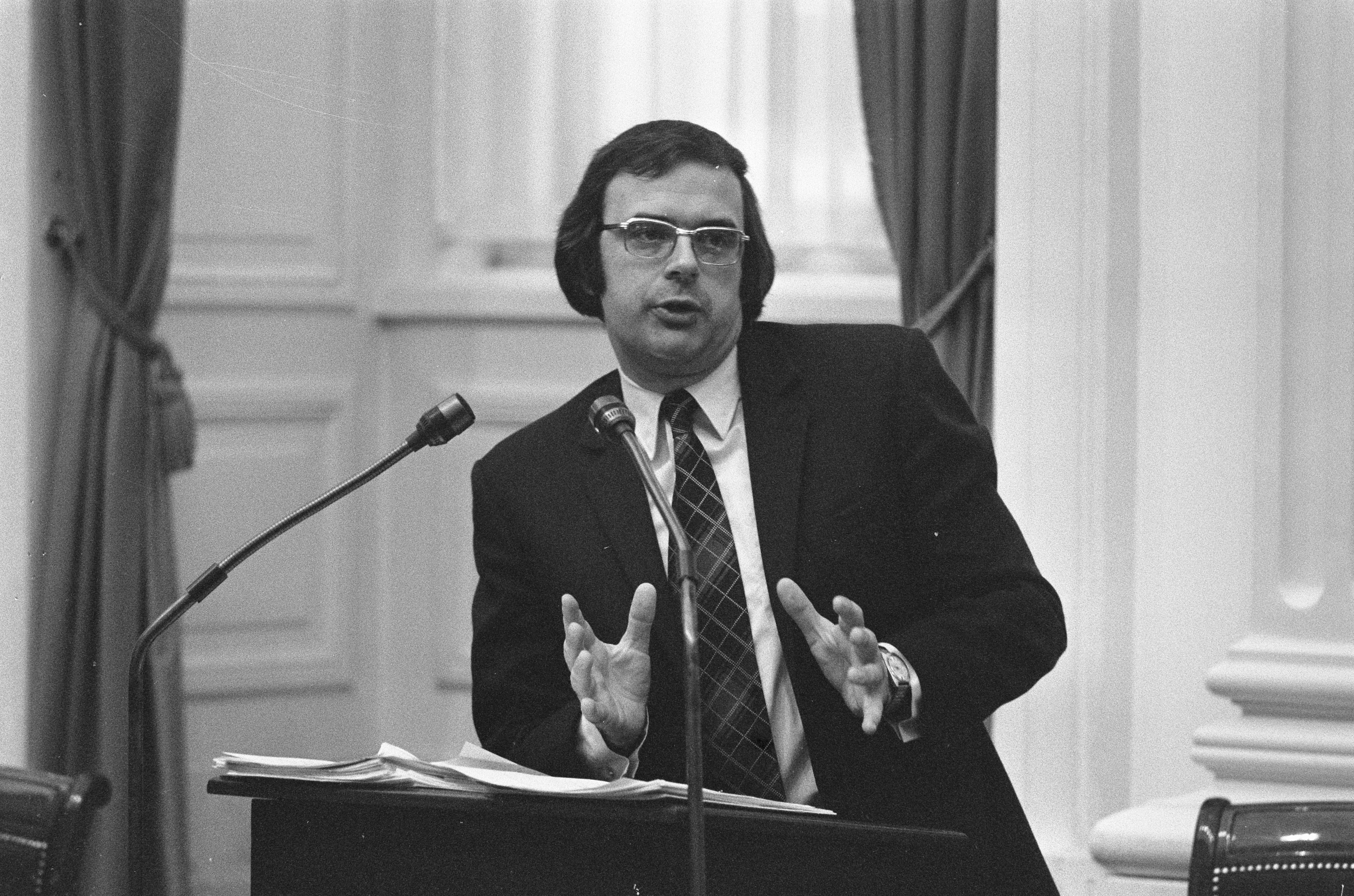 Collectie / Archief : Fotocollectie Anefo Reportage / Serie : Minister J. Pronk spreekt in de Tweede Kamer tijdens de behandeling van de begroting van Ontwikkelingshulp Beschrijving : De minister achter het spreekgestoelte Datum : 4 december 1973 Locatie : Den Haag, Zuid-Holland Trefwoorden : ministers, parlementaire debatten, portretten, spreekgestoelten Persoonsnaam : Pronk, Jan Instellingsnaam : Tweede Kamer Fotograaf : Fotograaf Onbekend / Anefo Auteursrechthebbende : Nationaal Archief Materiaalsoort : Negatief (zwart/wit) Nummer archiefinventaris : bekijk toegang 2.24.01.05 Bestanddeelnummer : 926-8670